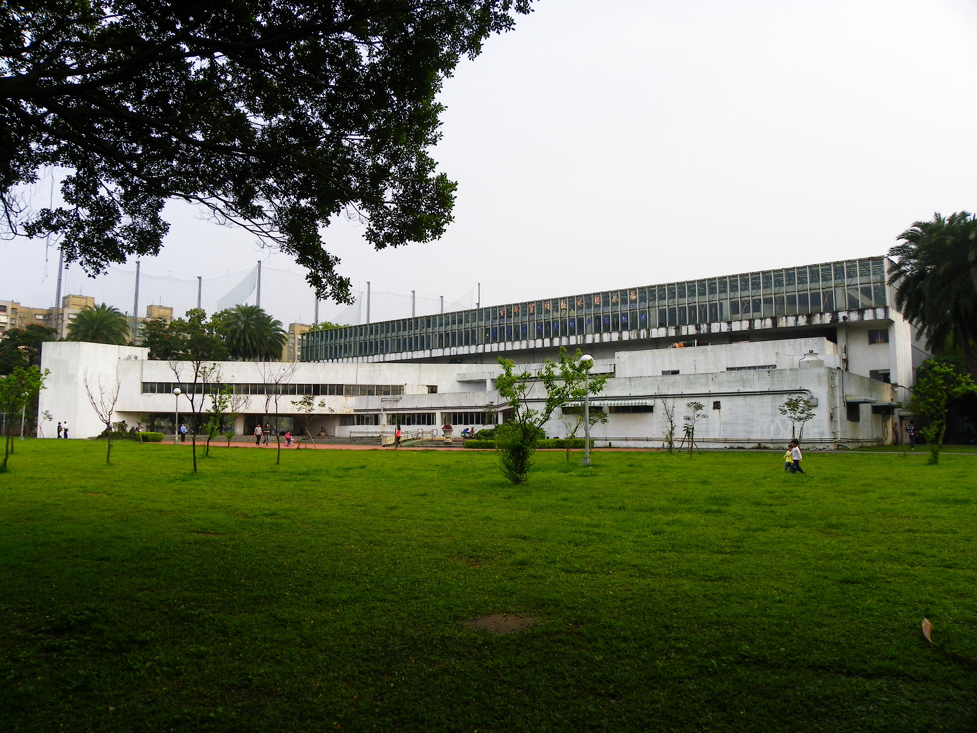 中文（台灣）: 自蓮華池南望青年公園東部的游泳池。